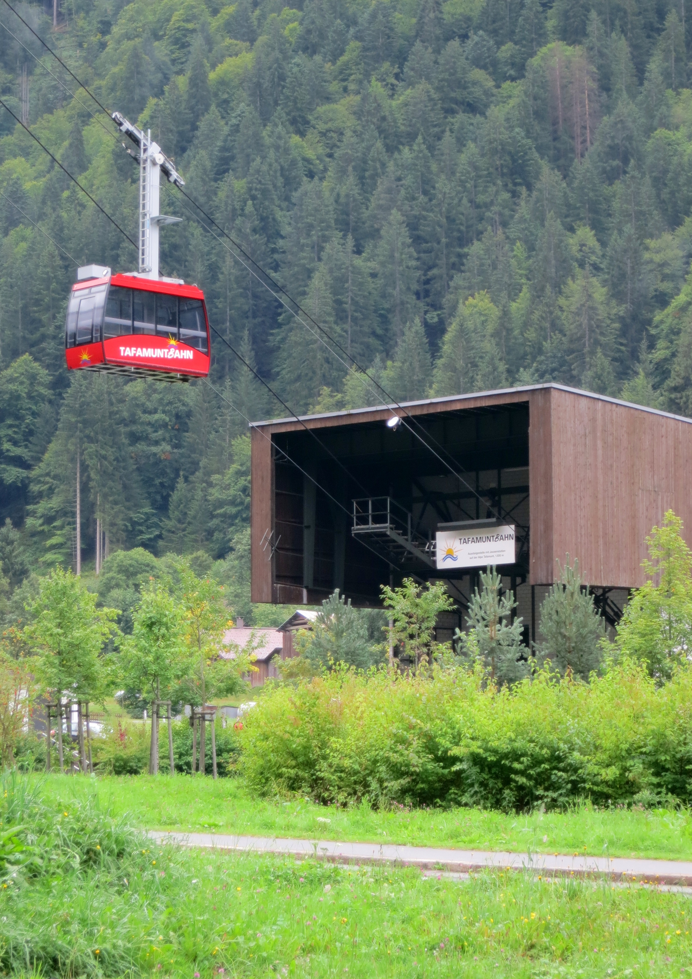 Einfahrt der Gondel in die Talstation der Tafamuntbahn in Partenen